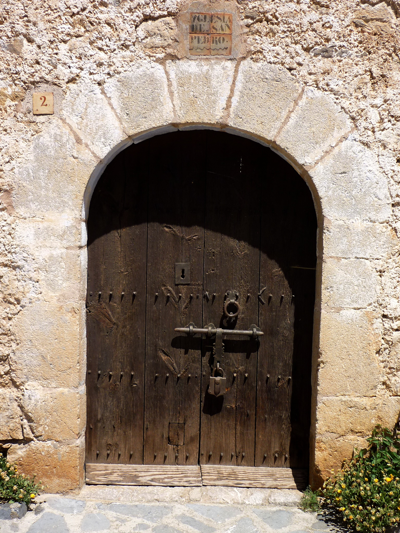 Església parroquial de Sant Pere de Cornellana (la Vansa i Fórnols): portal